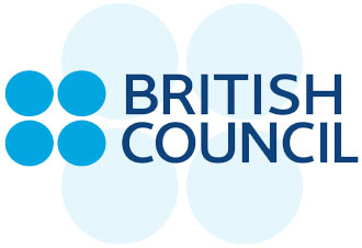 School